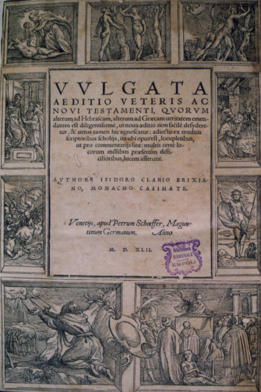 Vulgate, latin Bible. Title: Vulgata aeditio Veteris ac Novi Testamenti, quorum alterum ad Hebraicam, alterum ad Graecam ueritatem emendatum est diligentissimé, ut noua aeditio non facilè desyderetur, & uetus tamen hic agnoscatur: adiectis ex eruditis scriptoribus scholijs, ita ubi opus est, locupletibus, ut pro commentarijs sint: multis certè locorum millibus praesertim difficiliorbus, lucem afferunt